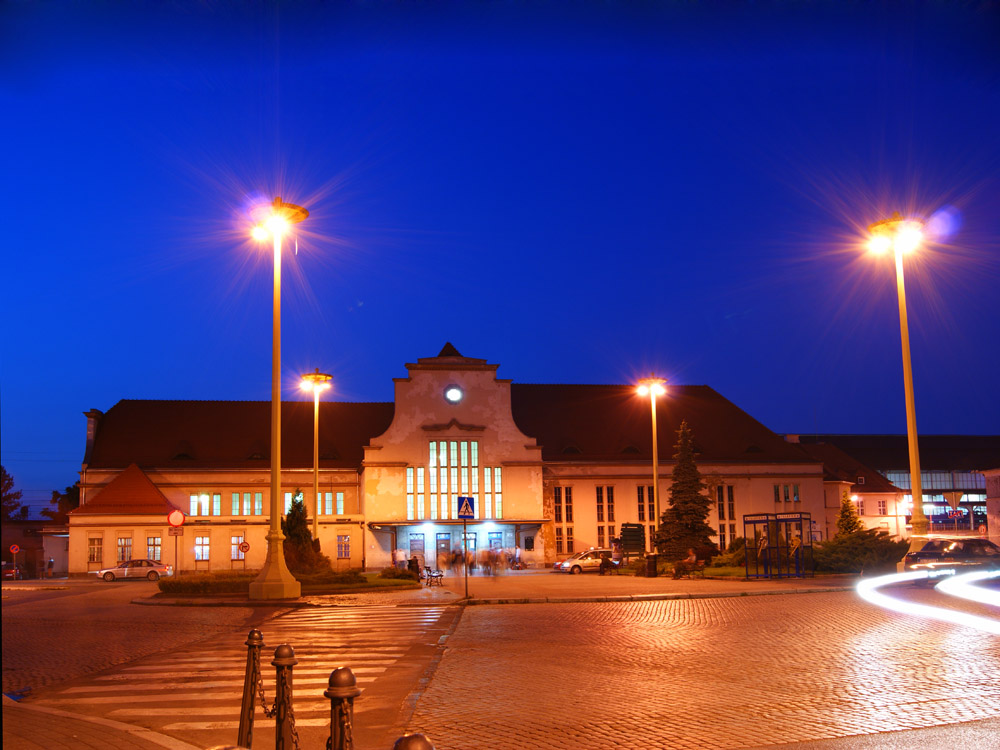 lew